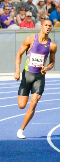 400 m during 2010 ISTAF Berlin (Kamghe Gaba)